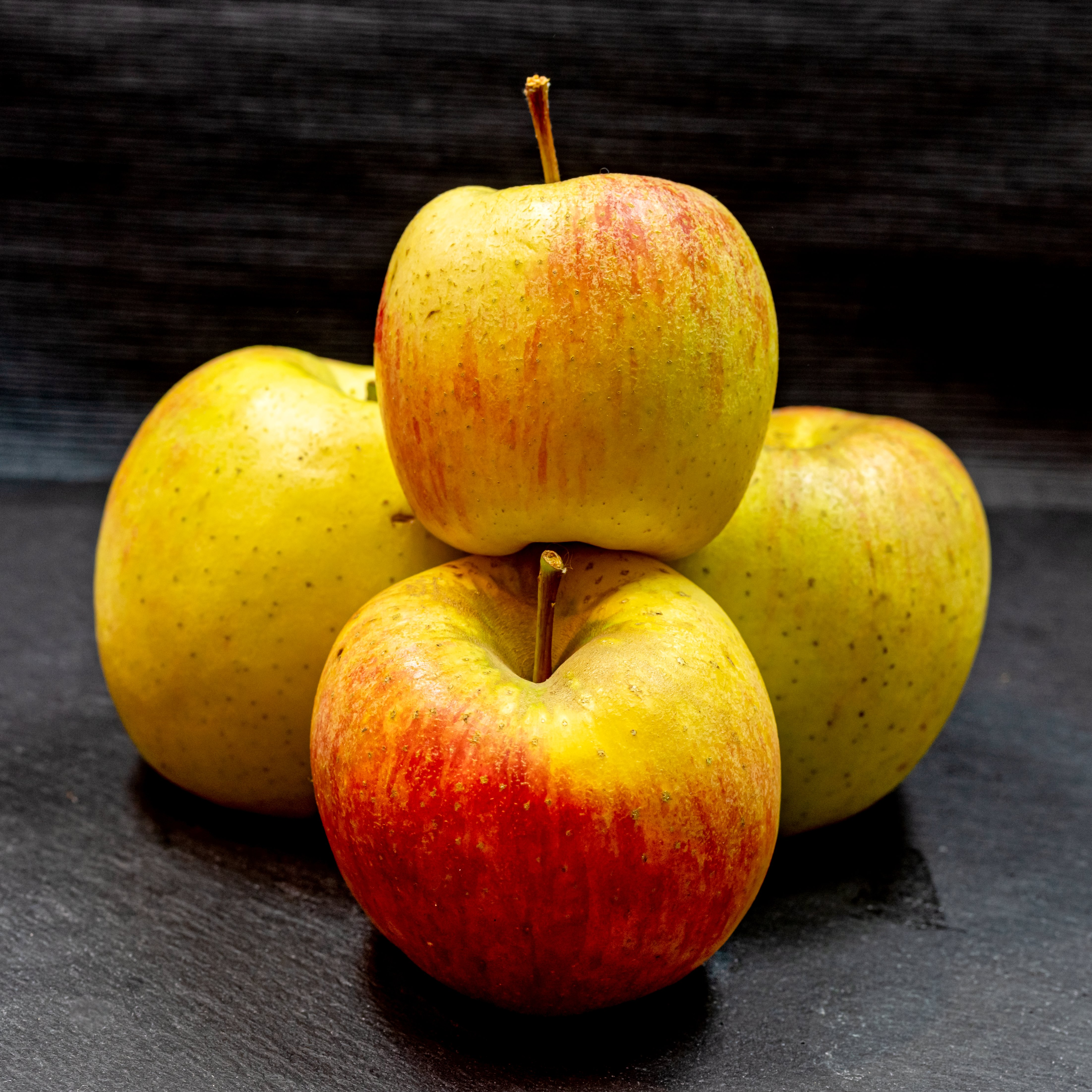 Apfelsorte: Zari Die Früchte - jeweils 5 pro Sorte - wurden mir vom Obsthof Drechsle netterweise kostenlos für die Wikipedia Photographien zur Verfügung gestellt´. Vielen Dank dafür.